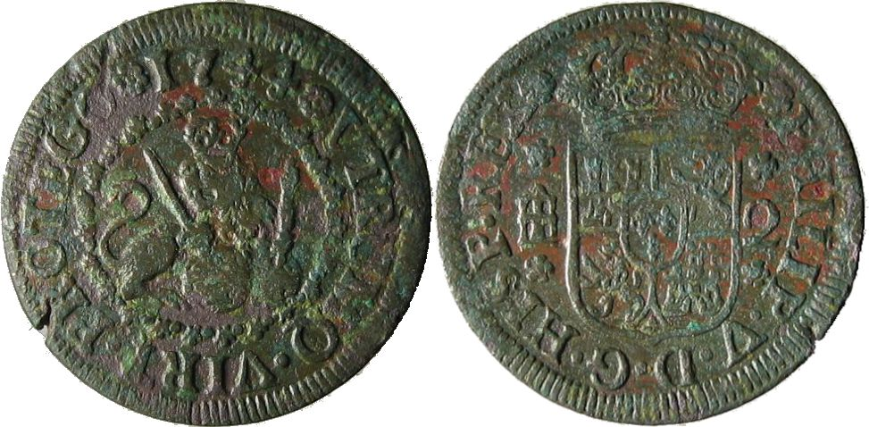 nº B-017-1 Tipo: 2 MARAVEDIS FELIPE V DE BORBÓN Año: 1744 Material: Cobre Medida: 21 mm. Peso: 4.50 gr. Anverso: PHILIPPUS V D G HISPAN REX (Felipe V por la gracia de Dios rey de las Españas) alrededor del escudo coronado de castillos y leónes entre acueducto (ceca) y valor 2. Reverso: VTRVMQ VIRT PROTEGO 1744 (protector de la virtud en ambos mundos) alrededor de un león coronado con cetro y sable con dos bolas que representan a los dos mundos a sus pies.